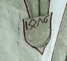 Inschrift zum Erbauungsjahr der Stadtkirche Pappenheim im Jahre 1476